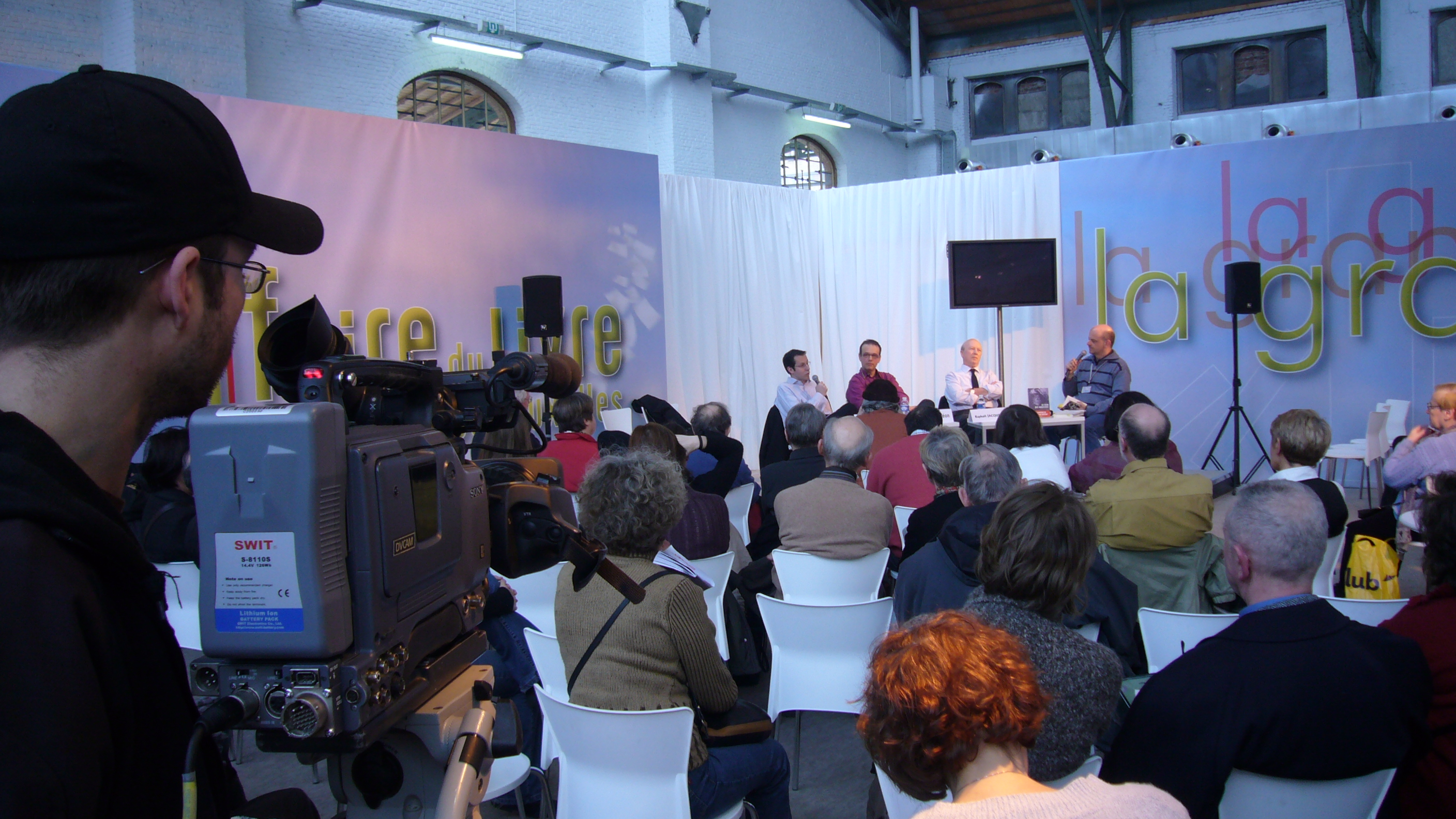 Un débat avec Christophe Léon, auteur du Somnambule Equivoque